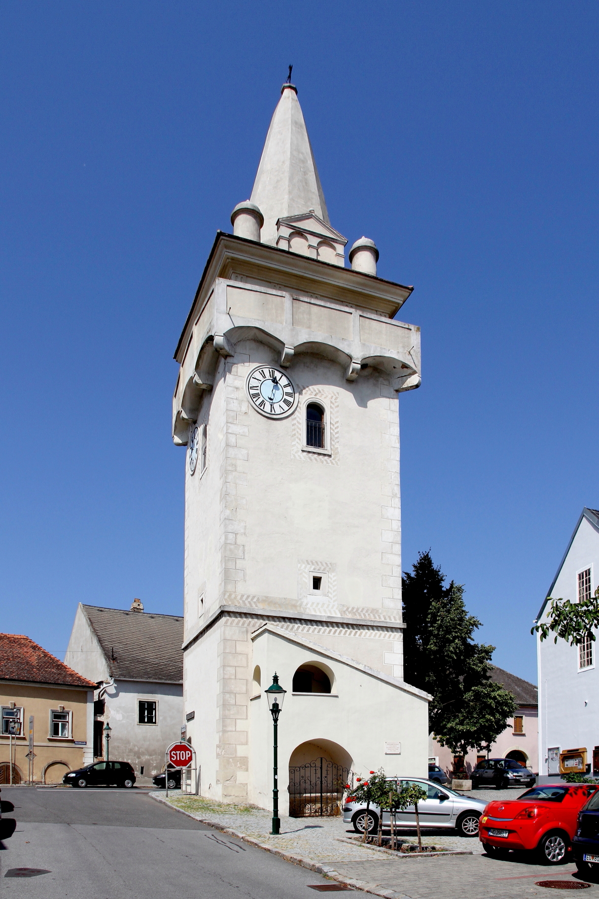 Wehrturm in der burgenländischen Marktgemeinde Breitenbrunn am Neusiedler See.